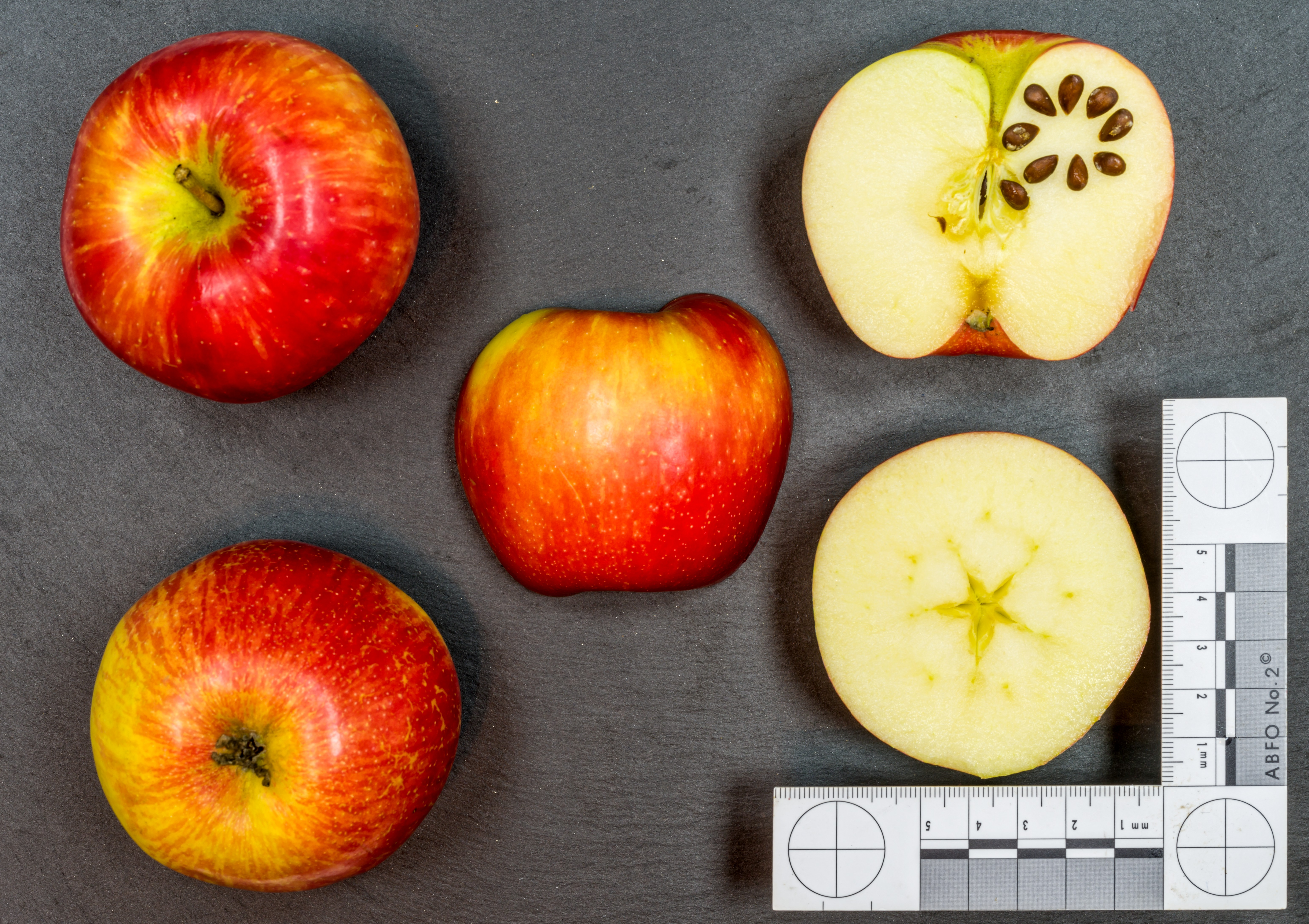 Honeycrunch, ist ein zweifarbig rot verwascher Apfel, gestreift auf grünem Grund, der Gelb wird, wenn die Frucht reif zum Essen ist mit einem ausgewogenen Verhältniss von Süße und Säure. Er ist eine Züchtung aus Minnesota, erster Anbau in Europa 1994 in der Gegend um Angers im Loiretal. Inzwischen wird er auch im Alten Land, Südfrika und Neuseeland angebaut 'Macoun' x 'Honeygold' Universität Minnesota, USA Fruchtgröße 75/90 Es ist „Global G.A.P“ zertifiziert..